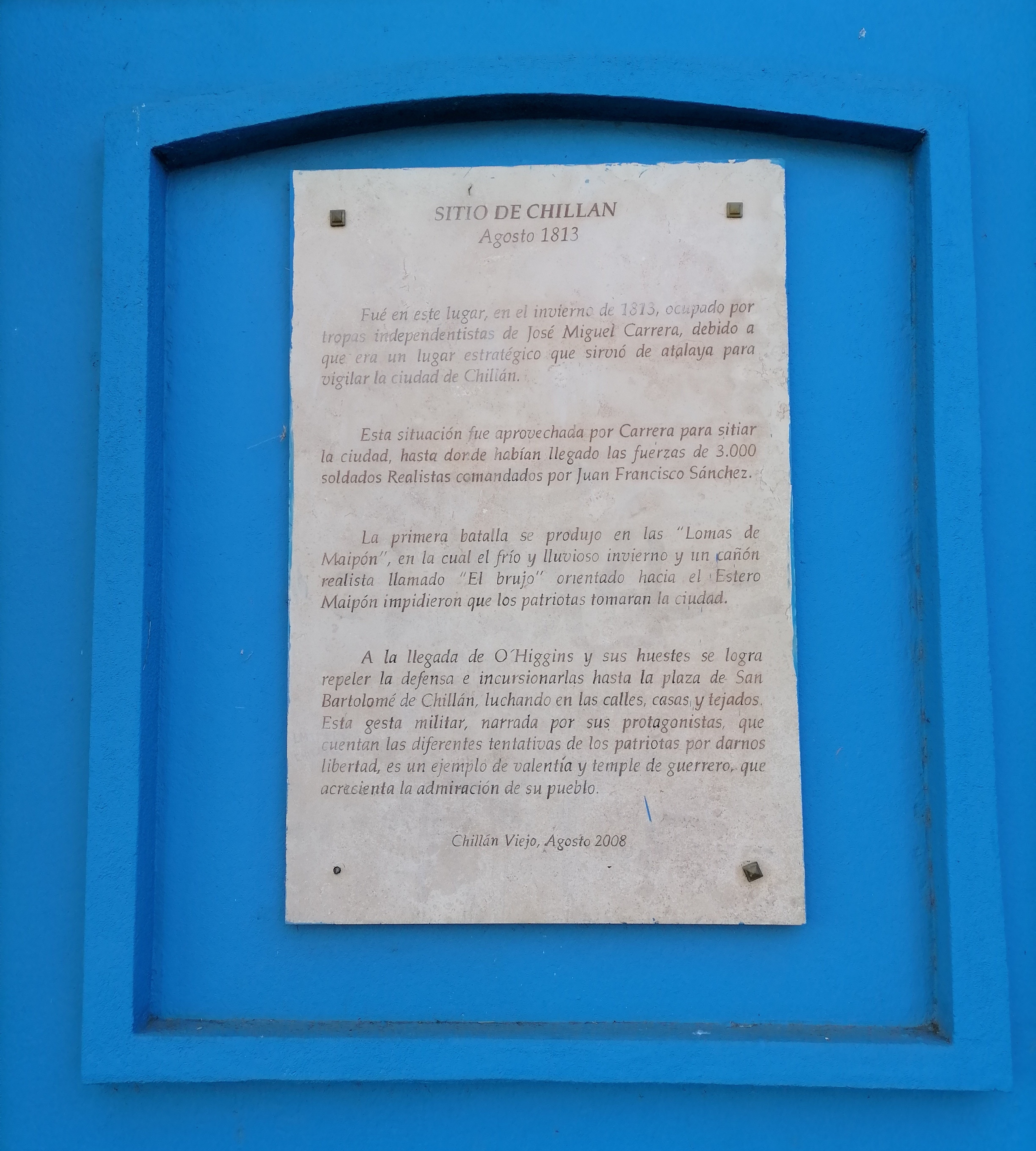 Placa conmemorativa del Sitio de Chillán, ubicada en el costado norponiente de Chillán Viejo